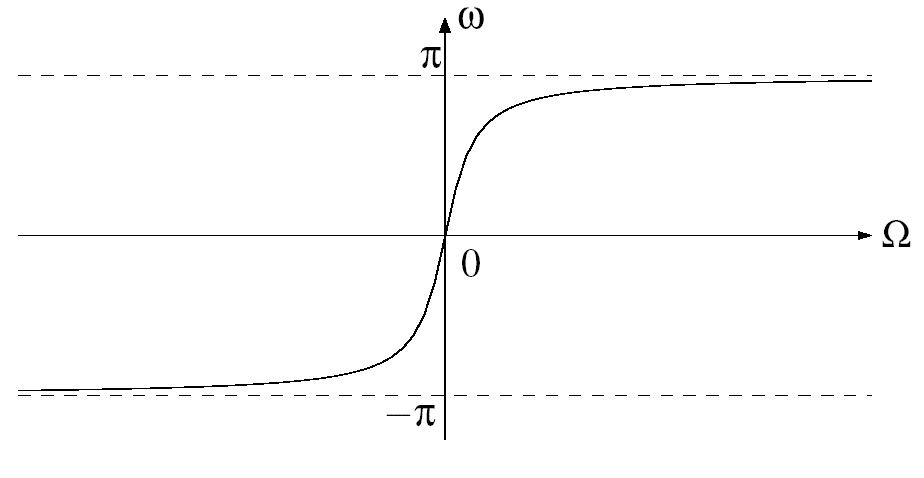 Darstellung des Phasenverlaufes bei der bilinearen Transformation; Phase diagram of the bilinear transform.